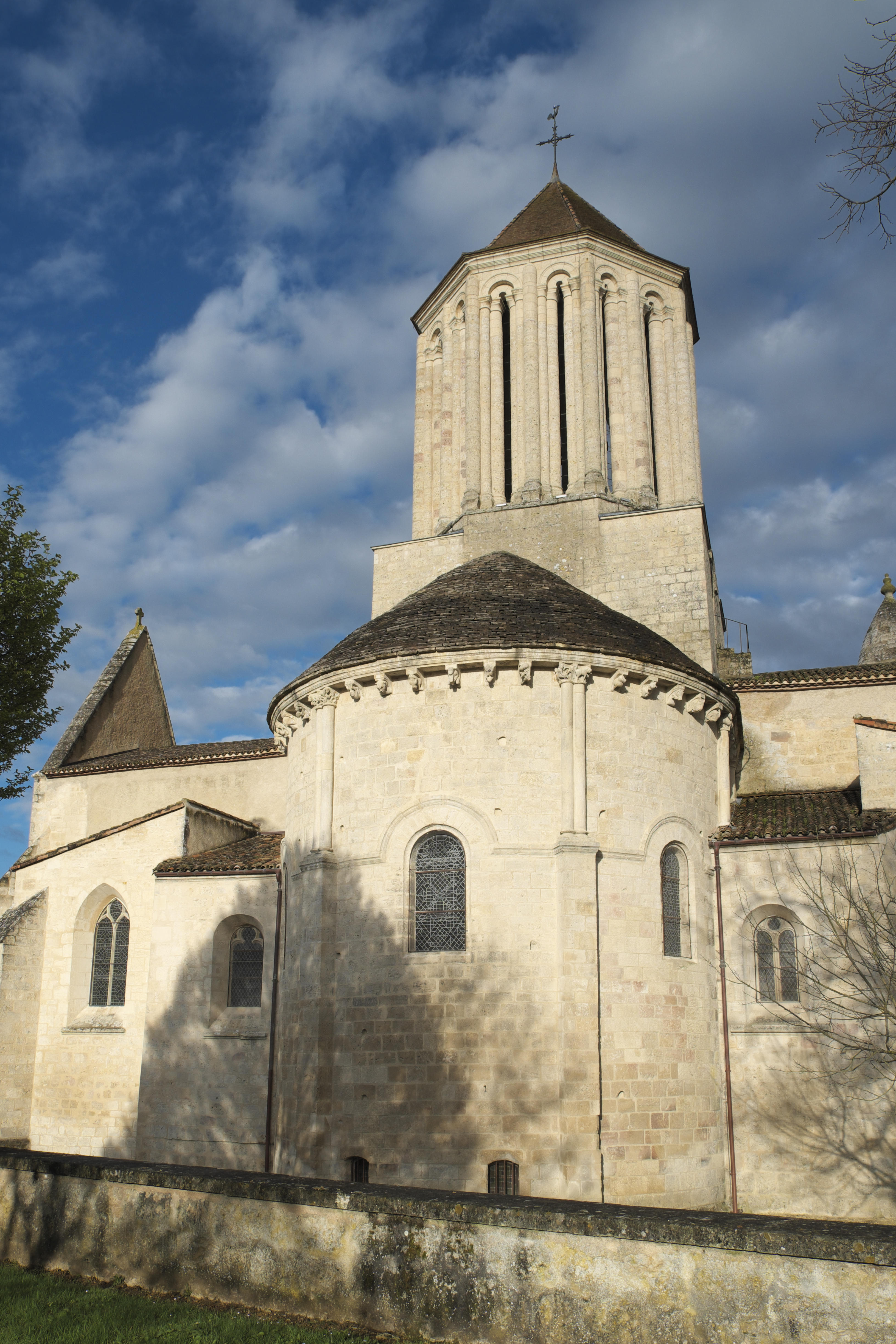 Katholische Kirche Notre-Dame-de-l’Assomption in Surgères im Département Charente-Maritime (Nouvelle-Aquitaine/Frankreich)